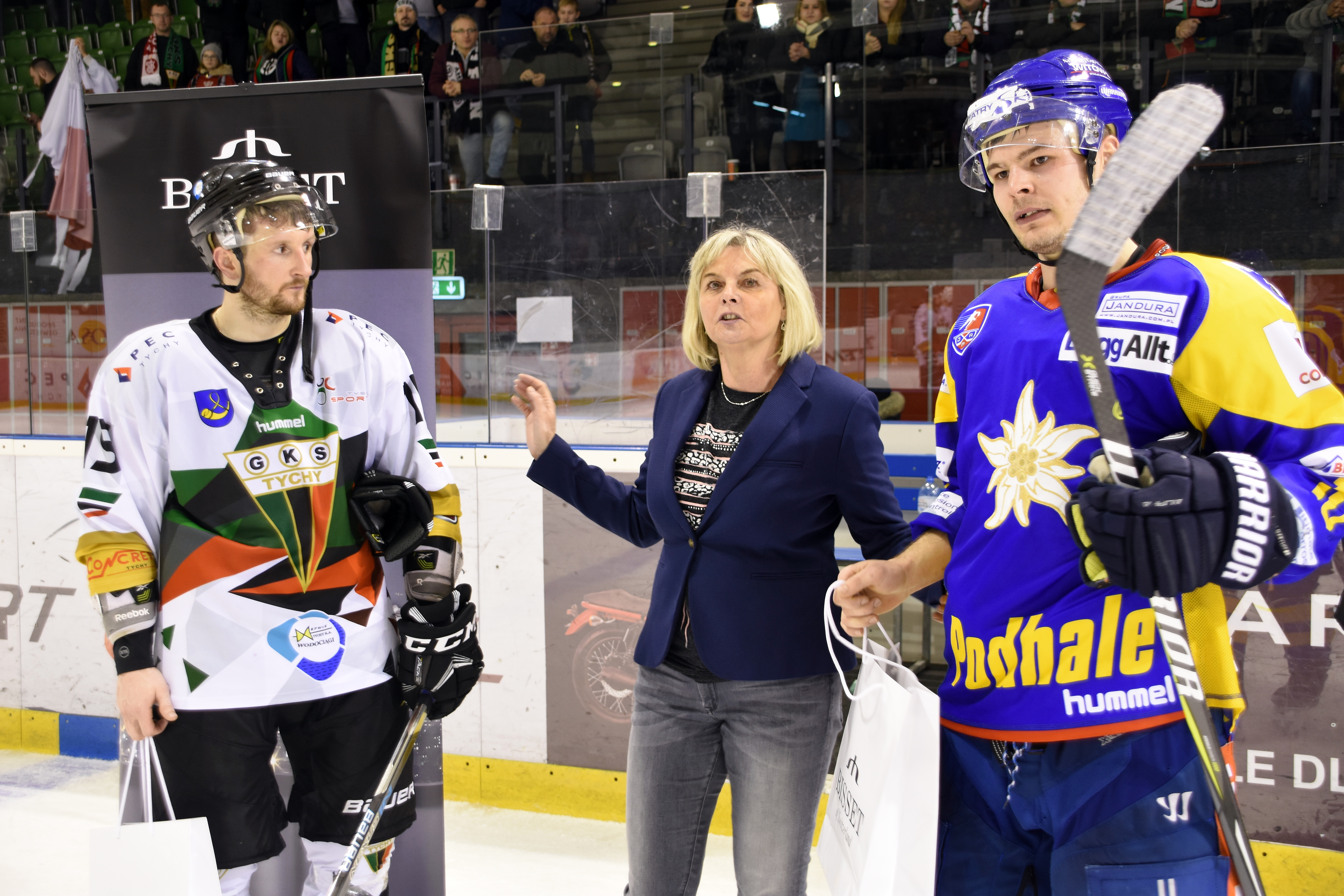 PP GKS Tychy - Podhale Nowy Targ